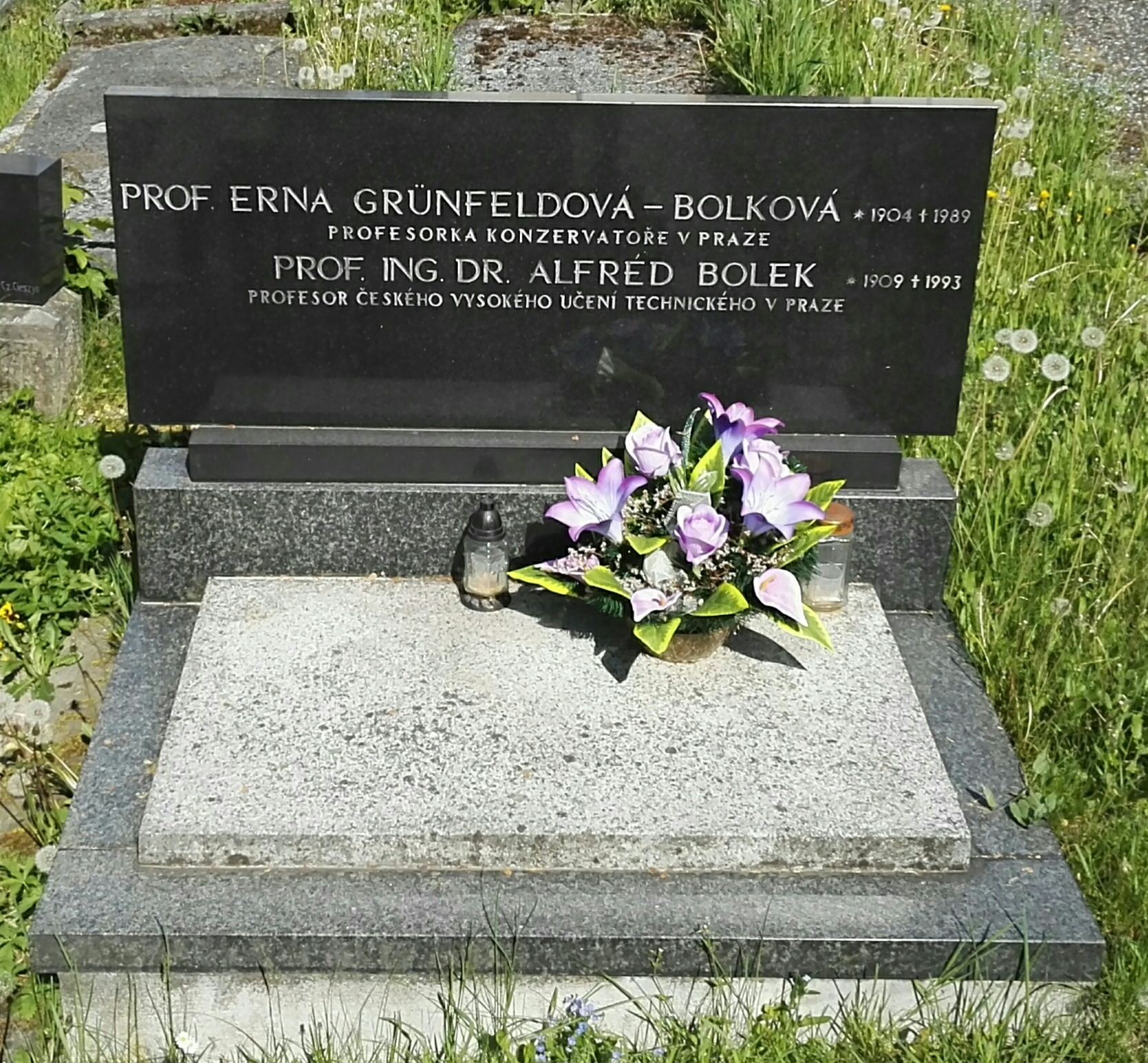 Horní Těrlicko. Evangelický hřbitov. Náhrobek prof. Alfreda Bolka a Erny Grünfeldové.